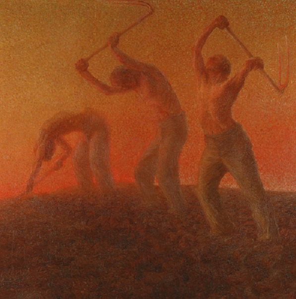 "I conquistatori del sole", olio su tela, 291 x 290 cm, firmata e datata, Vercelli, Museo Borgogna